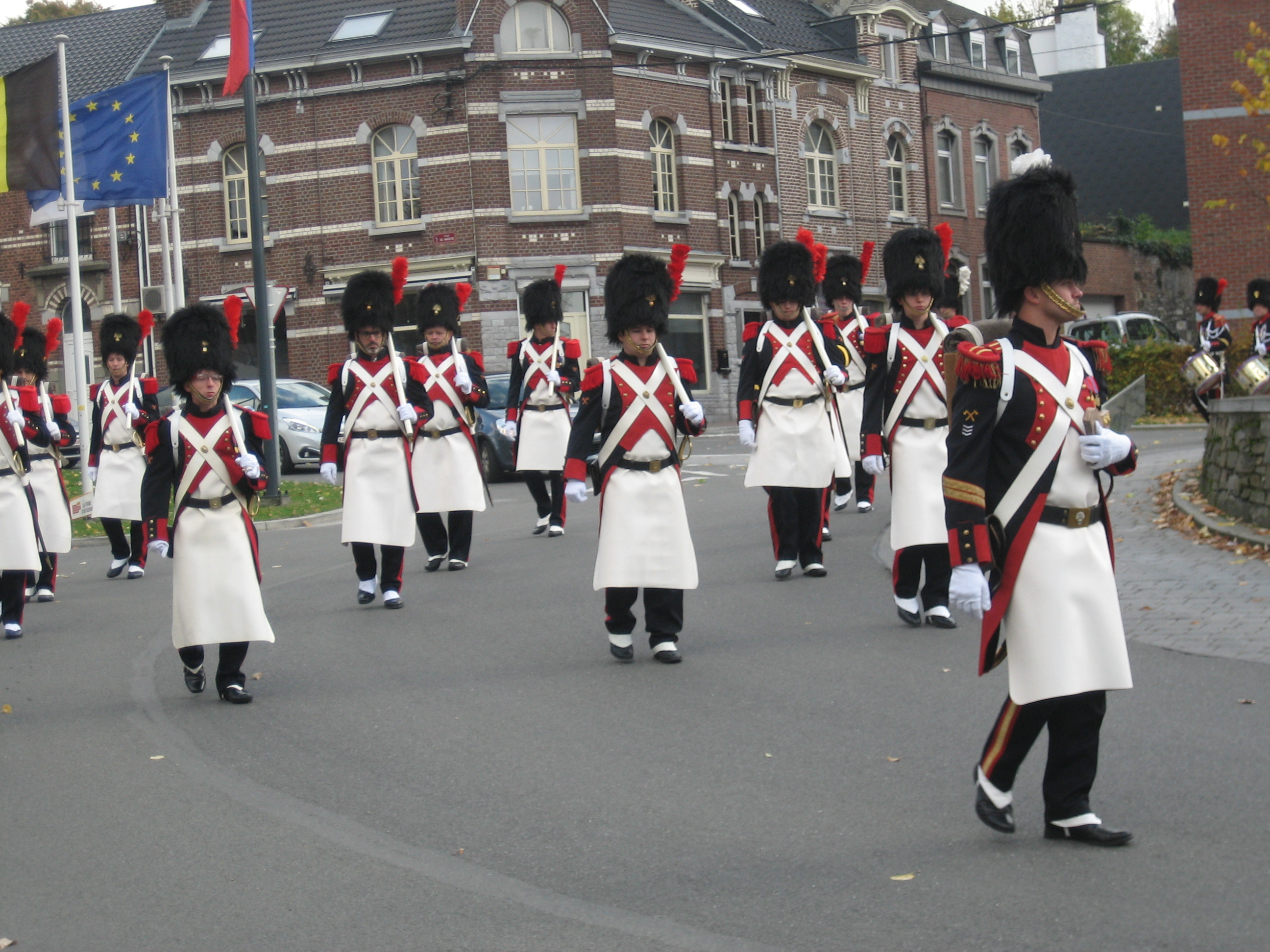 Sint-Martinusviering door de "Compagnie royale des Francs Arquebusiers" in Visé op zondag 6 november 2016.